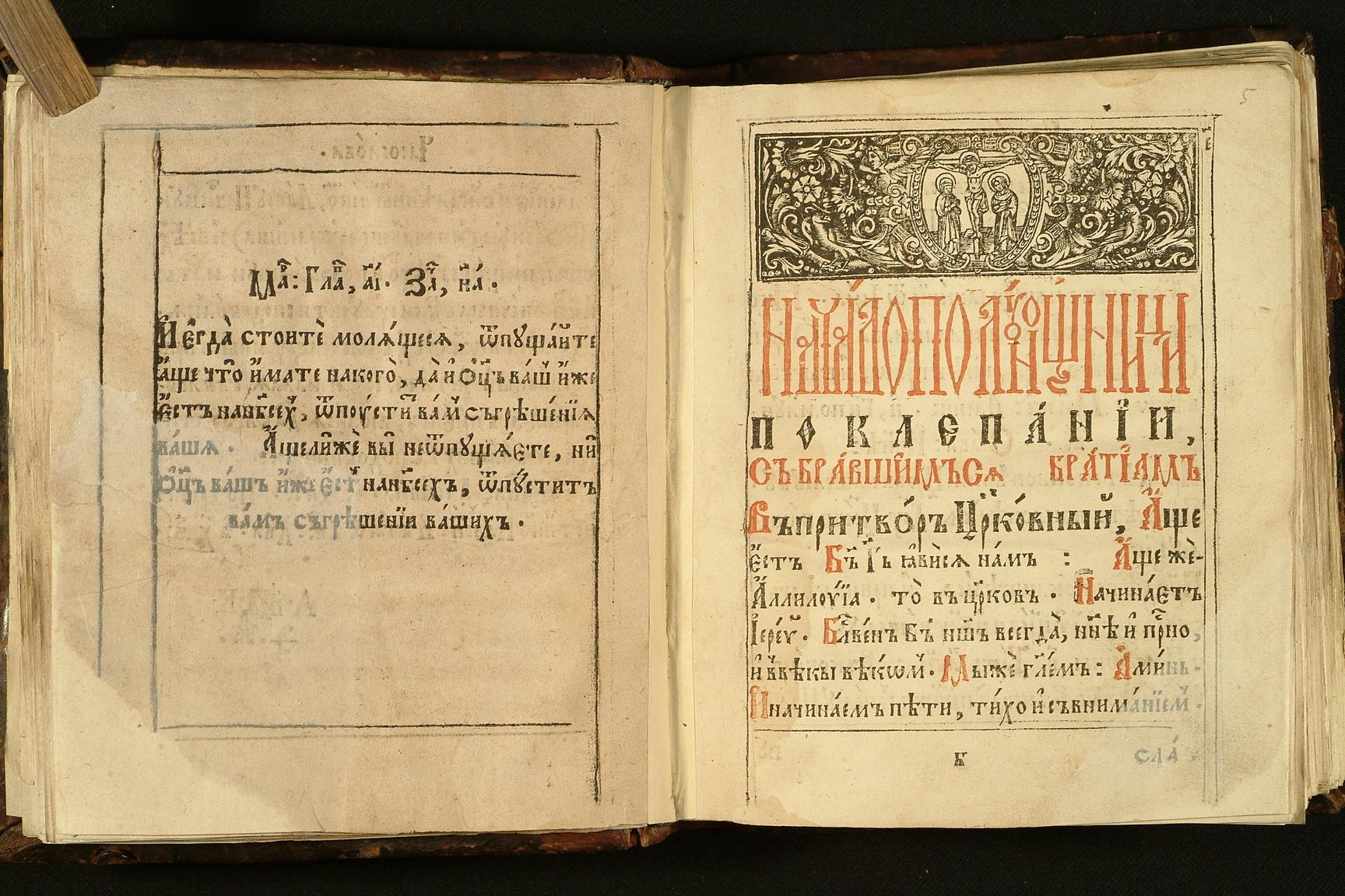 Богослужбова книга "Часослов", надрукована у Києві, у друкарні Києво-Печерської лаври, 30 грудня 1616 року (фотокопія). Перша сторінка після передмови